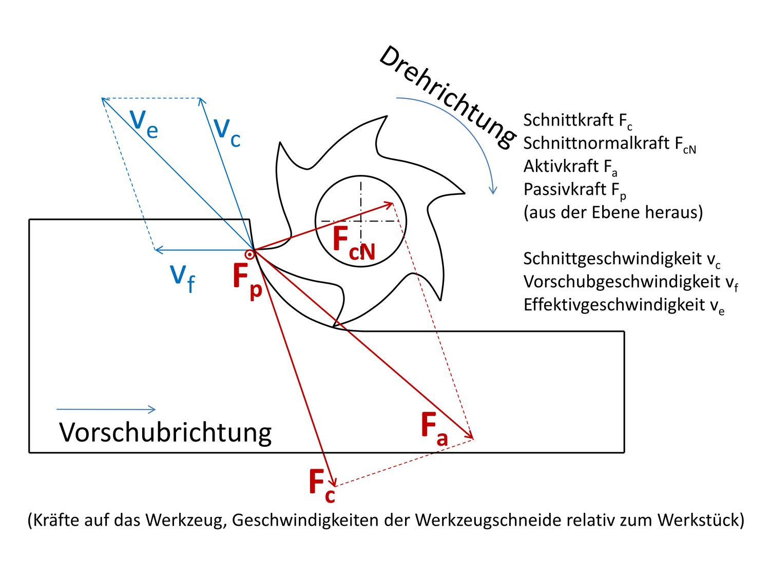 Darstellung der Bearbeitungskräfte beim Gegenlauffräsen